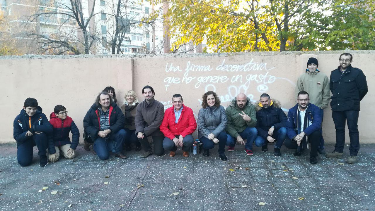 La Primera Edición del Certamen de Arte Urbano Juan Carlos Argüello “Muelle” organizado por la Junta Municipal de Latina ya tiene ganador. Se trata de Francisco Jaime Reyes que, con su obra “Muelle Fondo”, se ha alzado con el primer premio que ayer recibió de manos de la concejala del Distrito, Esther Gómez. Carlos Chicote con su obra “Buenas noches Muelle”, y Alberto Mingote Dueñas con “Tirabuzón”, han obtenido el segundo y tercer premio respectivamente.